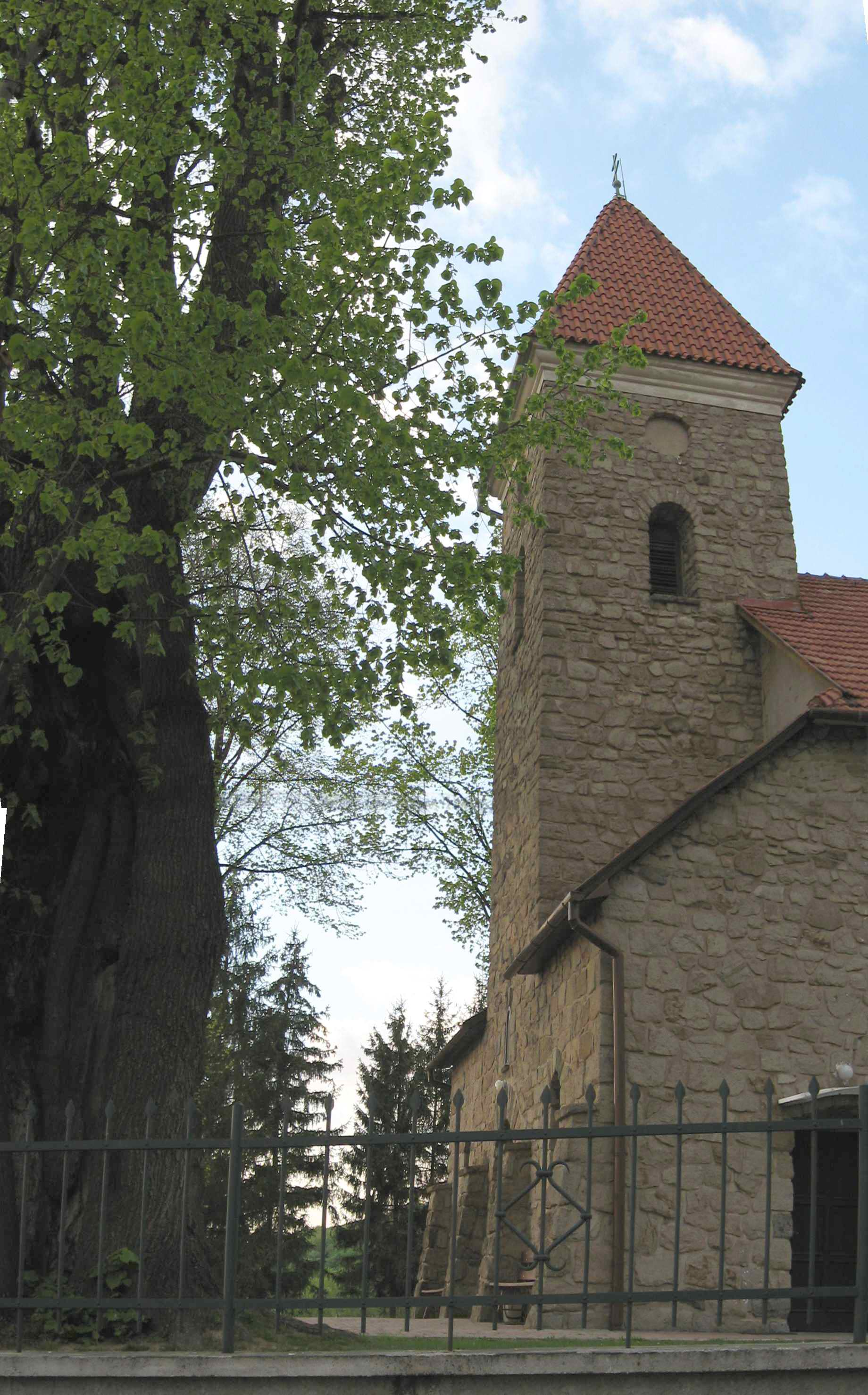 Kamenná veža kostola so starou lipou rastucou vedľa --Sandro 14:14, 10. máj 2007 (UTC)